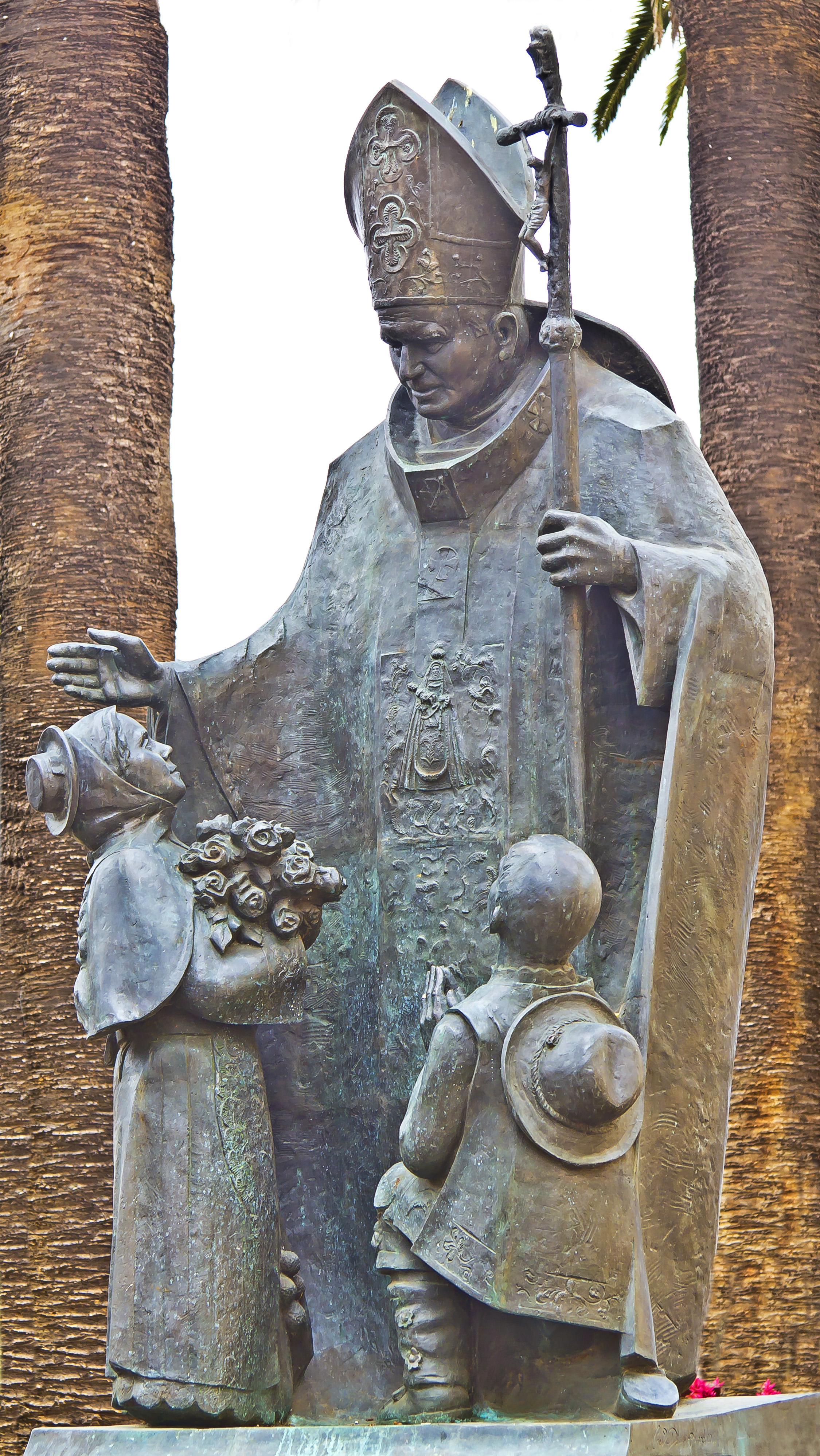 Plastik des Papstes Johannes Paul II auf der Südseite der Kirche Concepción in La Laguna (der Schöpfer der Plastik wird auf der Informationstafel nicht genannt)